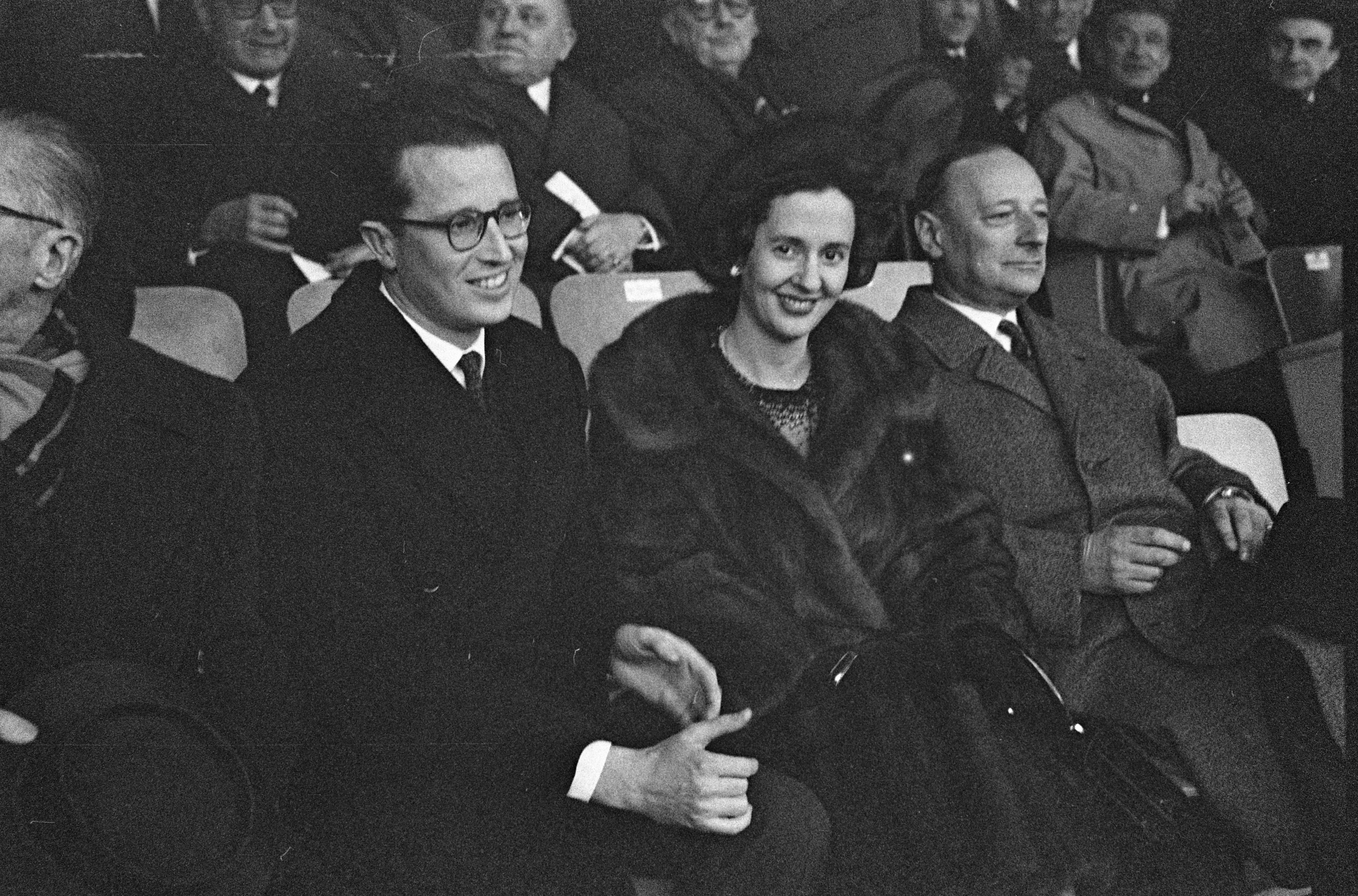 Collectie / Archief : Fotocollectie Anefo Reportage / Serie : [ onbekend ] Beschrijving : Standaard Luik tegen Real Madrid Koning Boudewijn en Fabiola Datum : 12 april 1962 Trefwoorden : koningen, sport, voetbal Persoonsnaam : Boudewijn, koning van België, Fabiola, koningin van België Instellingsnaam : Real Madrid, Standard Luik Fotograaf : Pot, Harry / Anefo Auteursrechthebbende : Nationaal Archief Materiaalsoort : Negatief (zwart/wit) Nummer archiefinventaris : bekijk toegang 2.24.01.05 Bestanddeelnummer : 913-7602